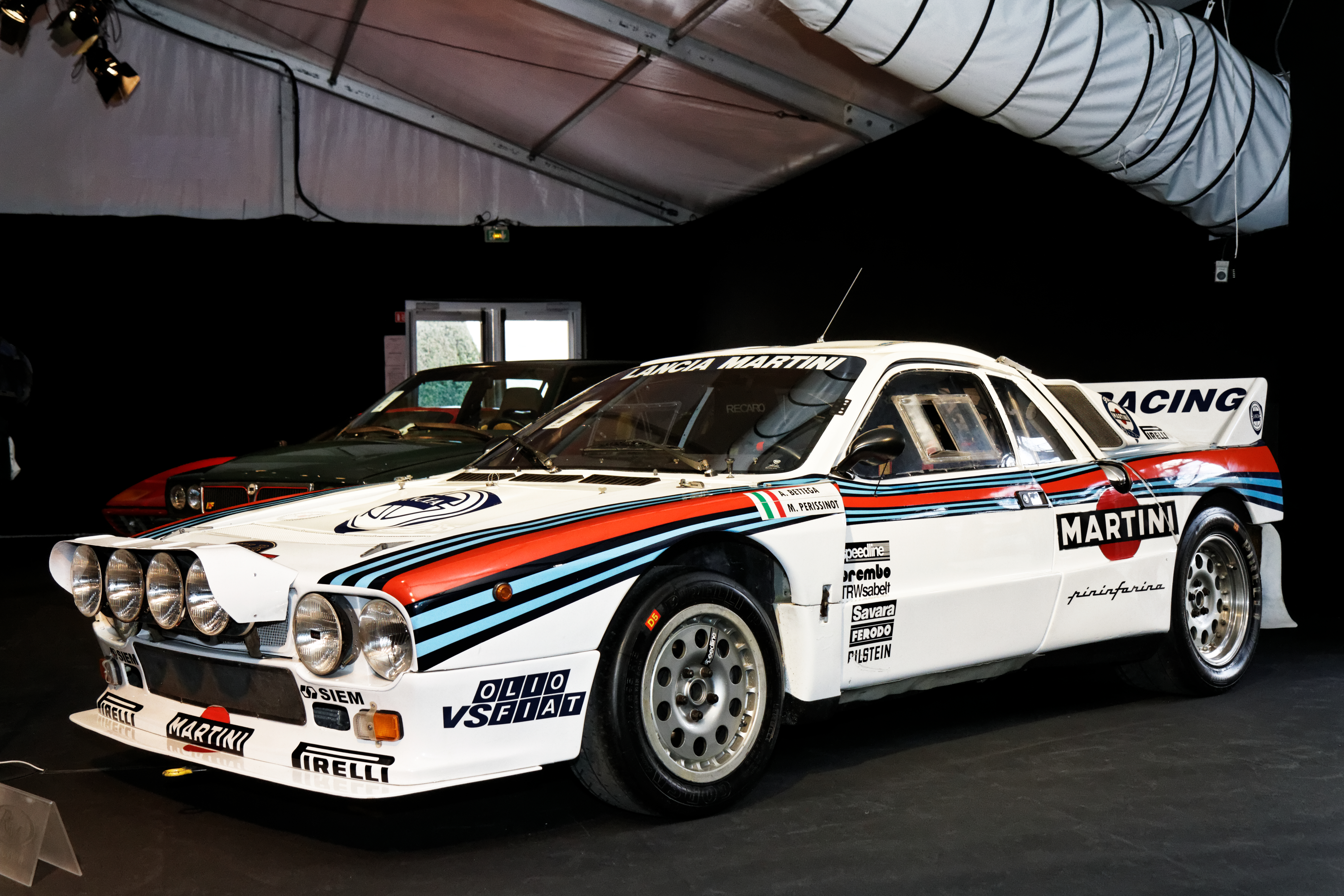 Une Lancia 037 Group B de 1983.